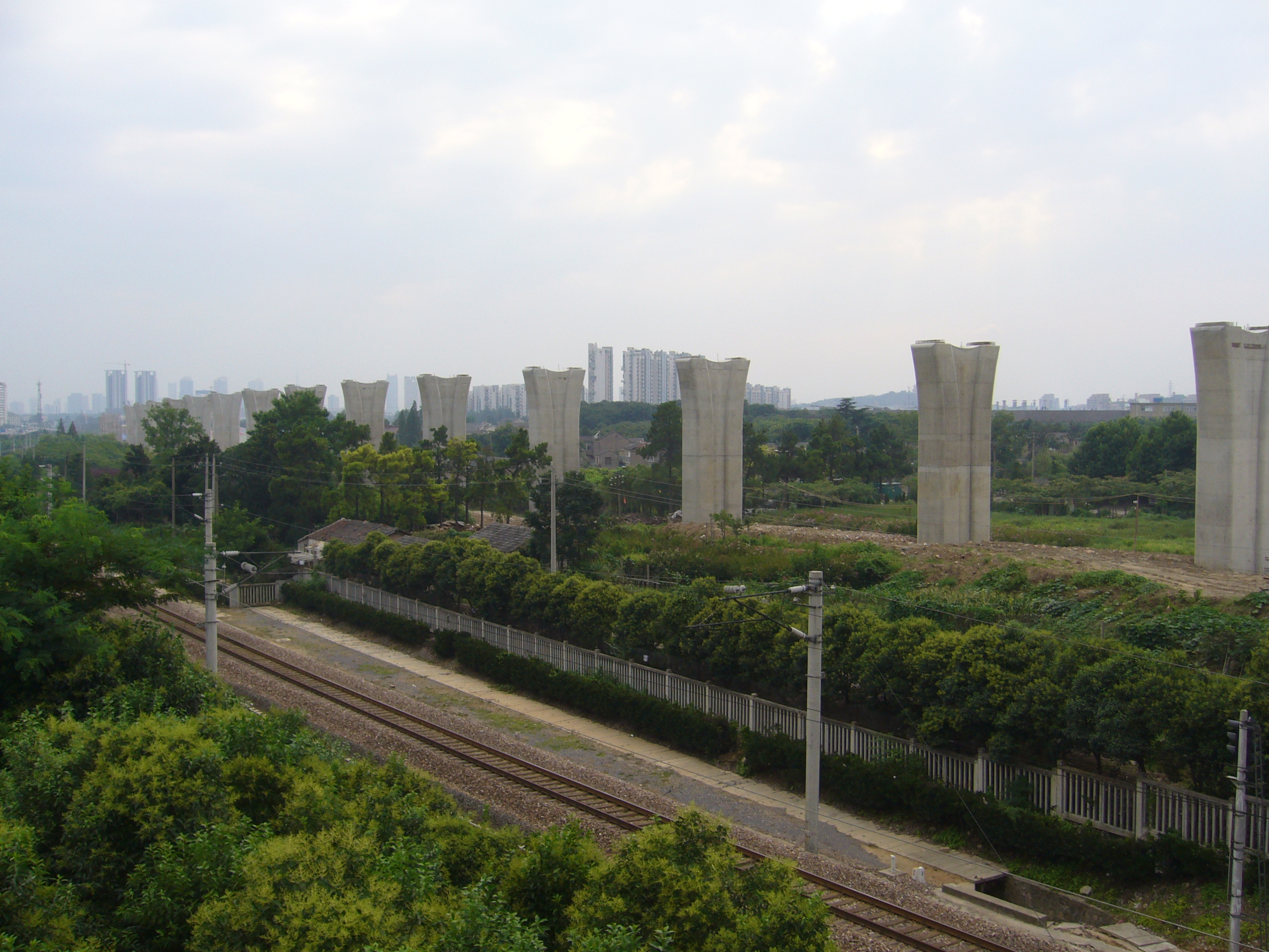 京沪铁路大动脉